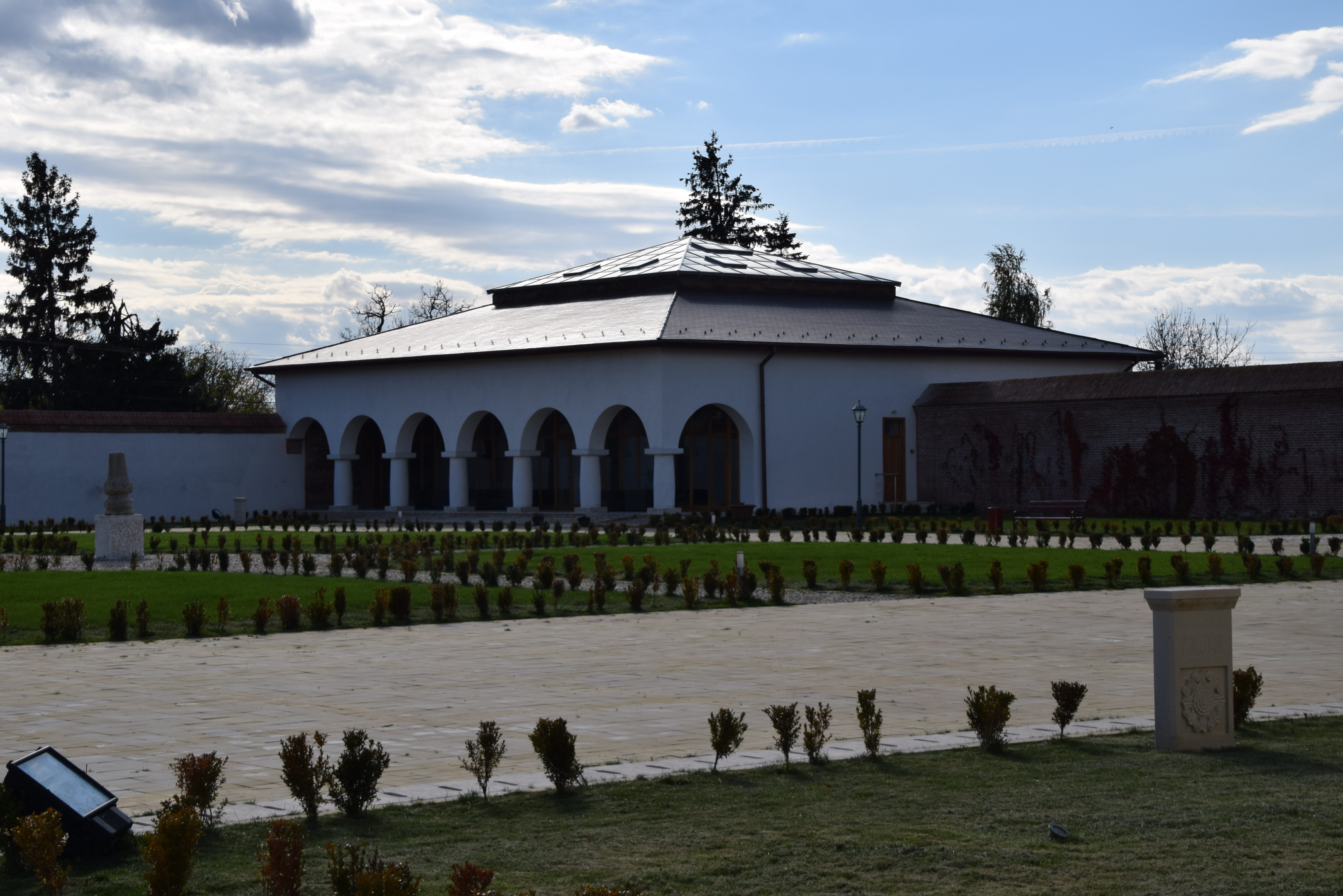 Ruinele droșcăriei nu mai sunt vizibile, clădirea fiind reconstruită în timpul restaurării din 2014. 06